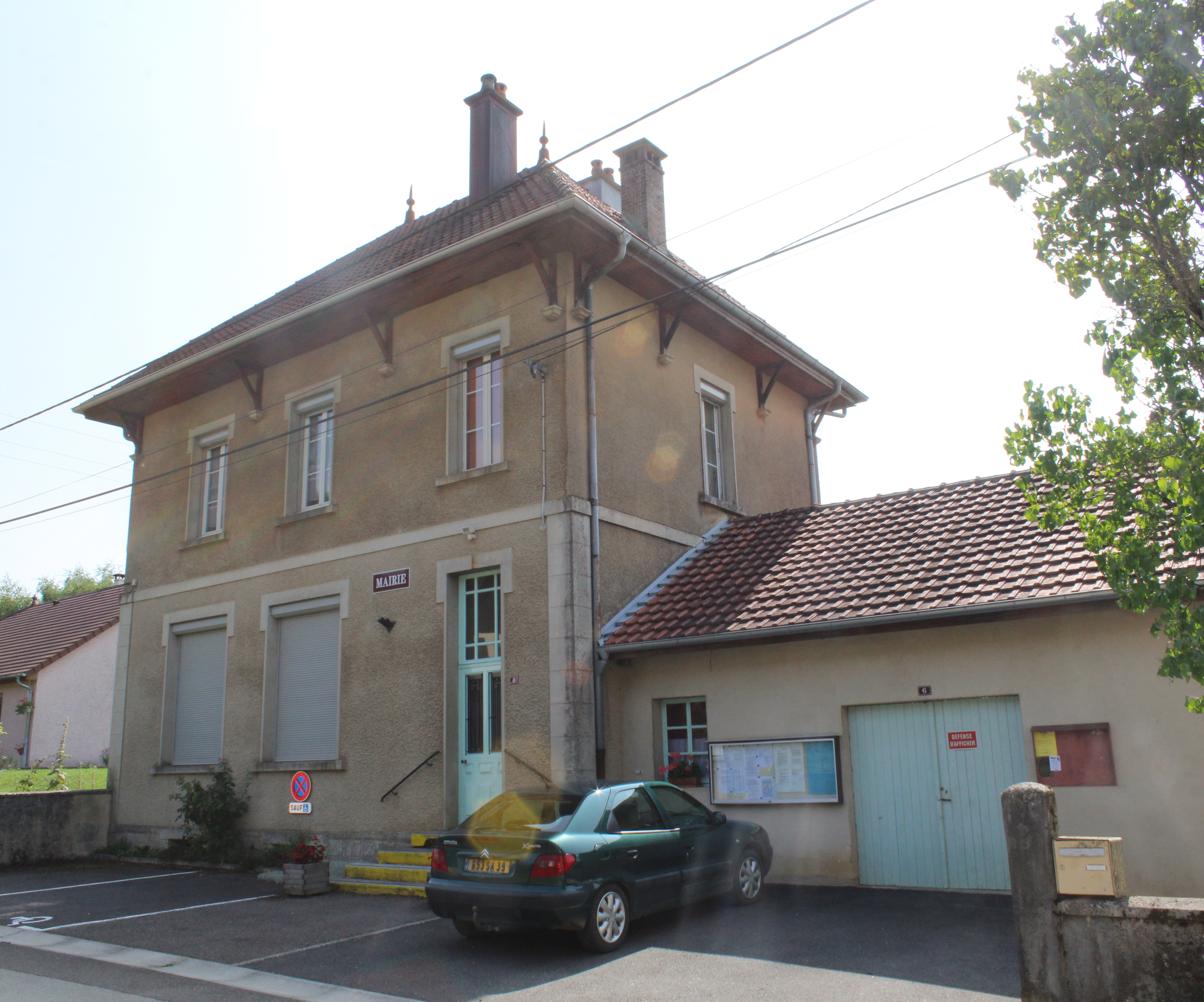 Mairie de Clucy.